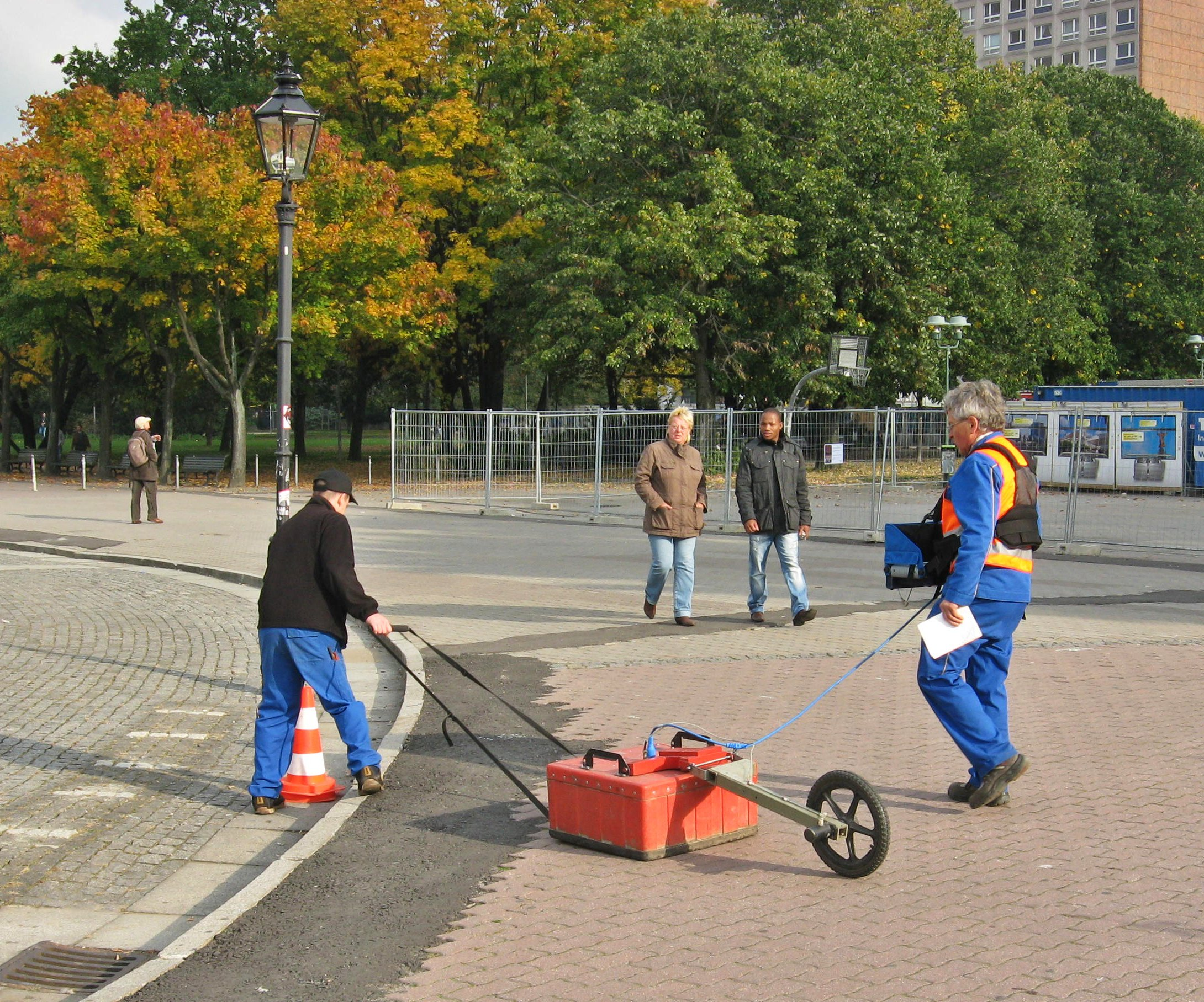 Bodenradar im Einsatz für archäologische Sondierungen am Neptunbrunnen vor der Marienkirche in Berlin-Mitte